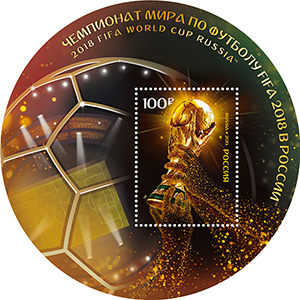 Чемпионат мира по футболу FIFA 2018 в России